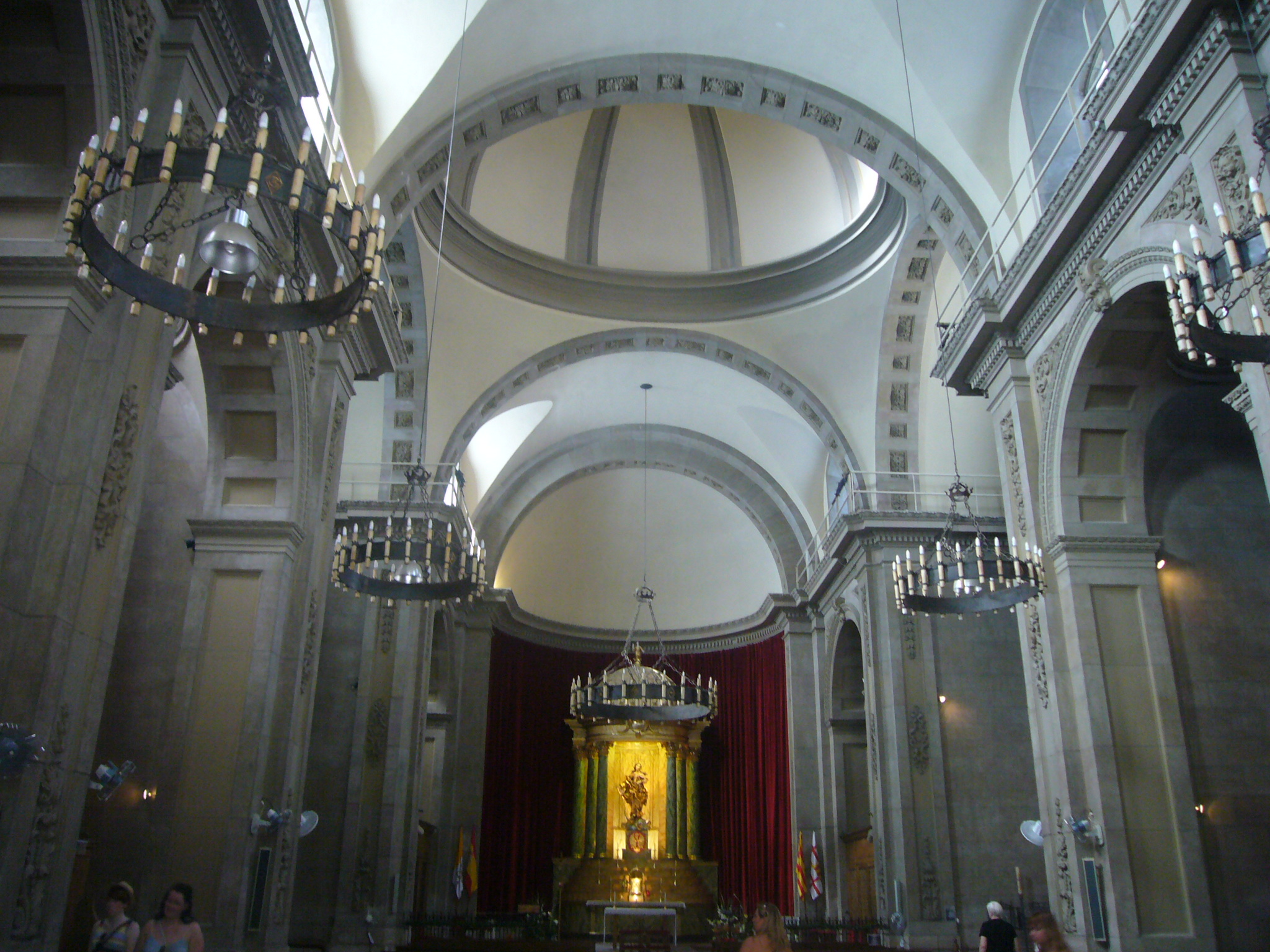 Església de la Ciutadella, nau